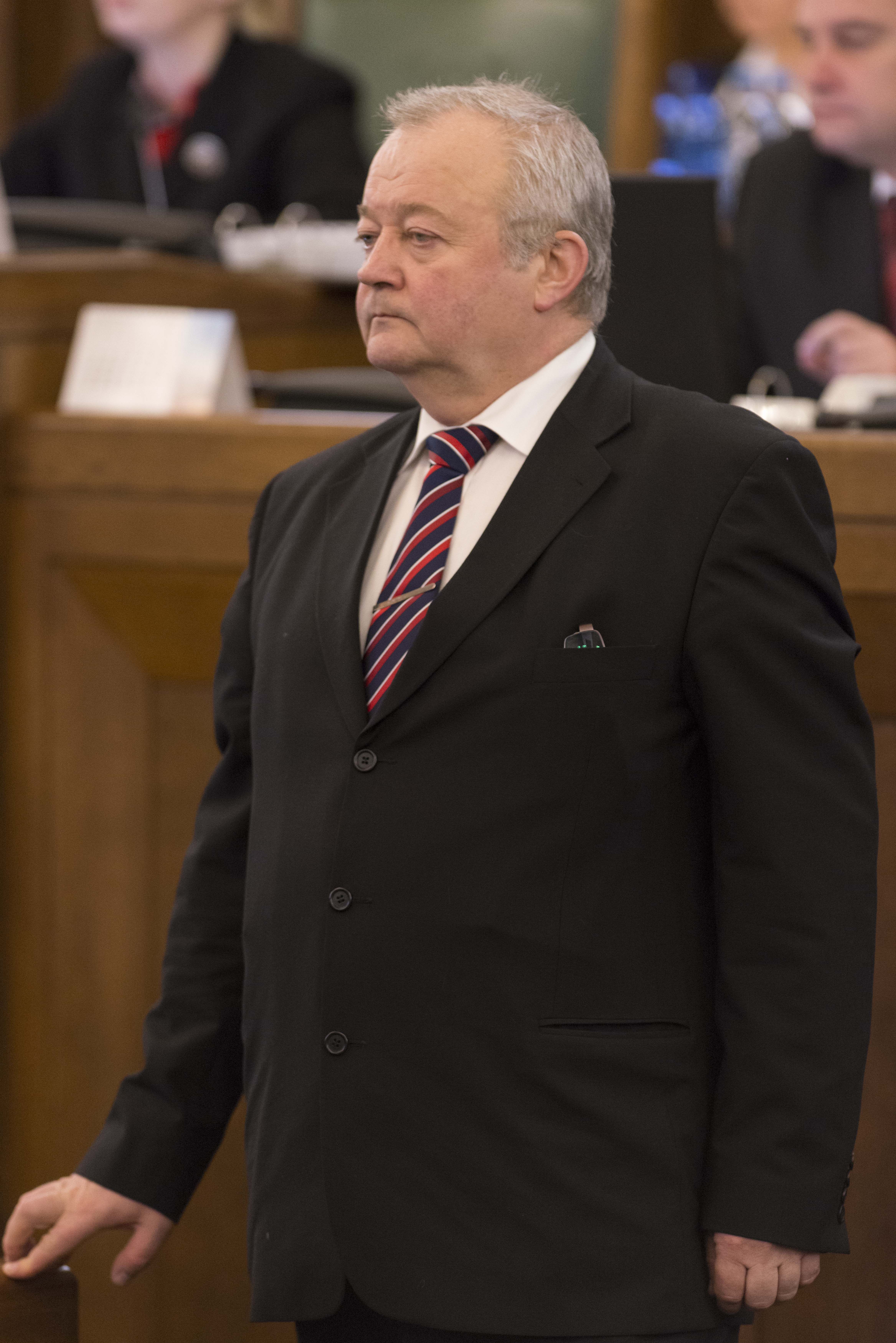 2015.gada 15.janvāris. Darbs Saeimas sēdē. Foto: Reinis Inkēns, Saeimas Kanceleja Izmantošanas noteikumi: saeima.lv/lv/autortiesibas